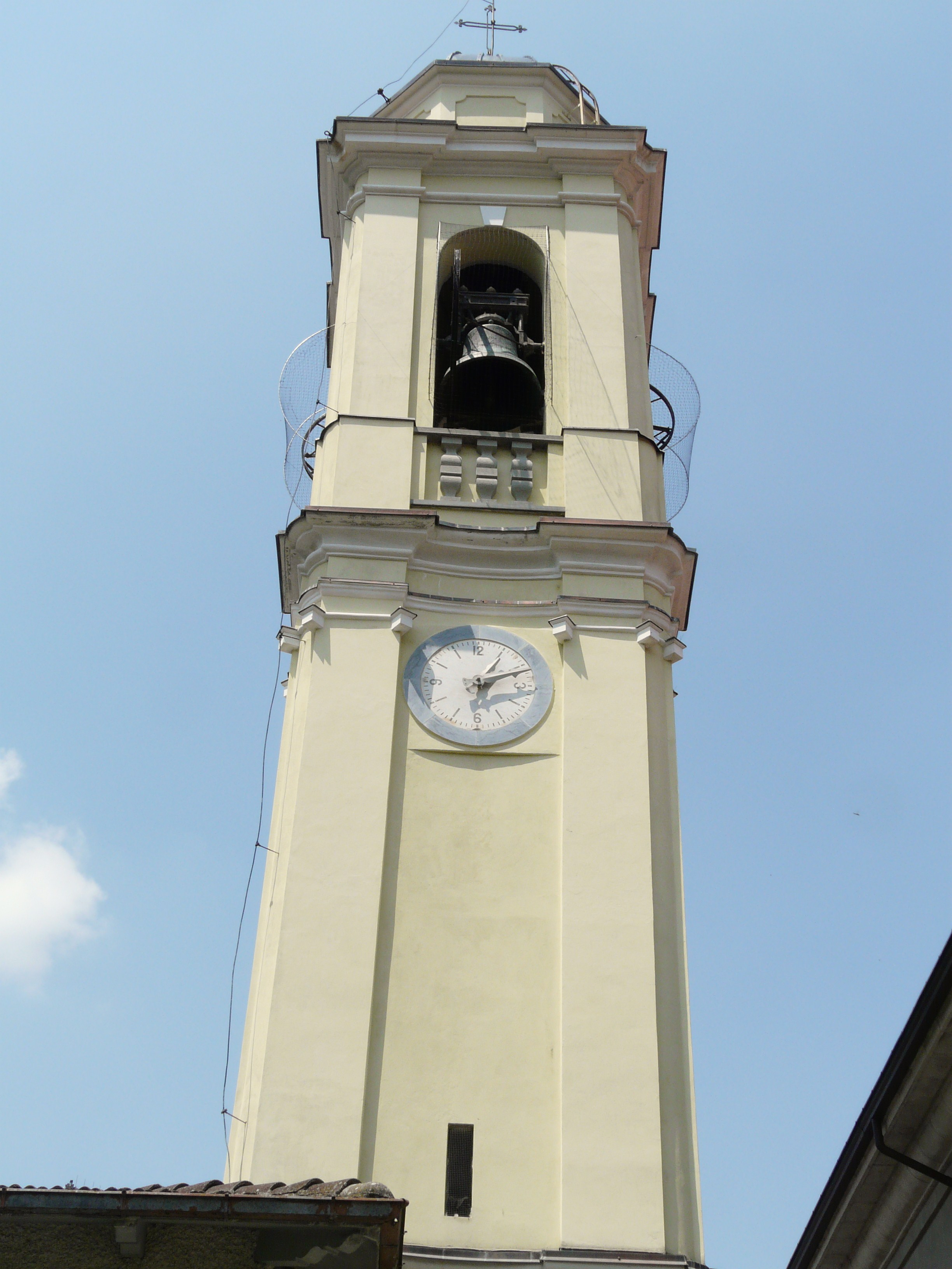 Campanile della chiesa di Albareto, Emilia Romagna, Italia